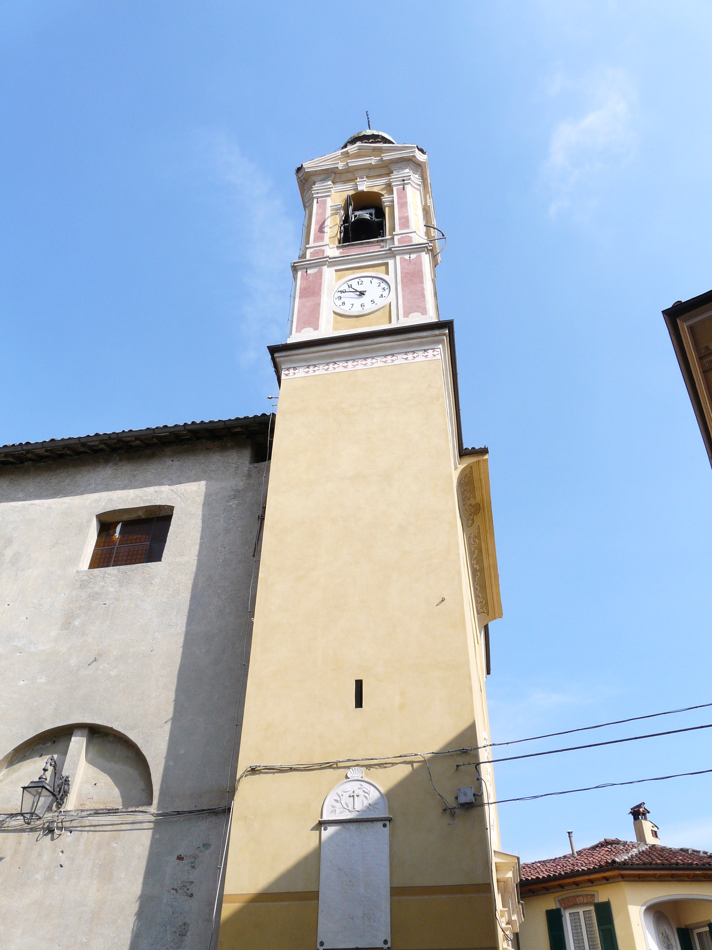 Campanile della chiesa di San Nicola, Mallare, Liguria, Italia